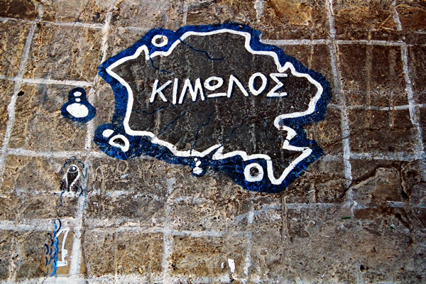 Titel: Afbeelding van het eiland (Chorio) Locatie: Kimolos, Griekenland Datum: juni 2003 Fotograaf: Gebruiker:IMFJ